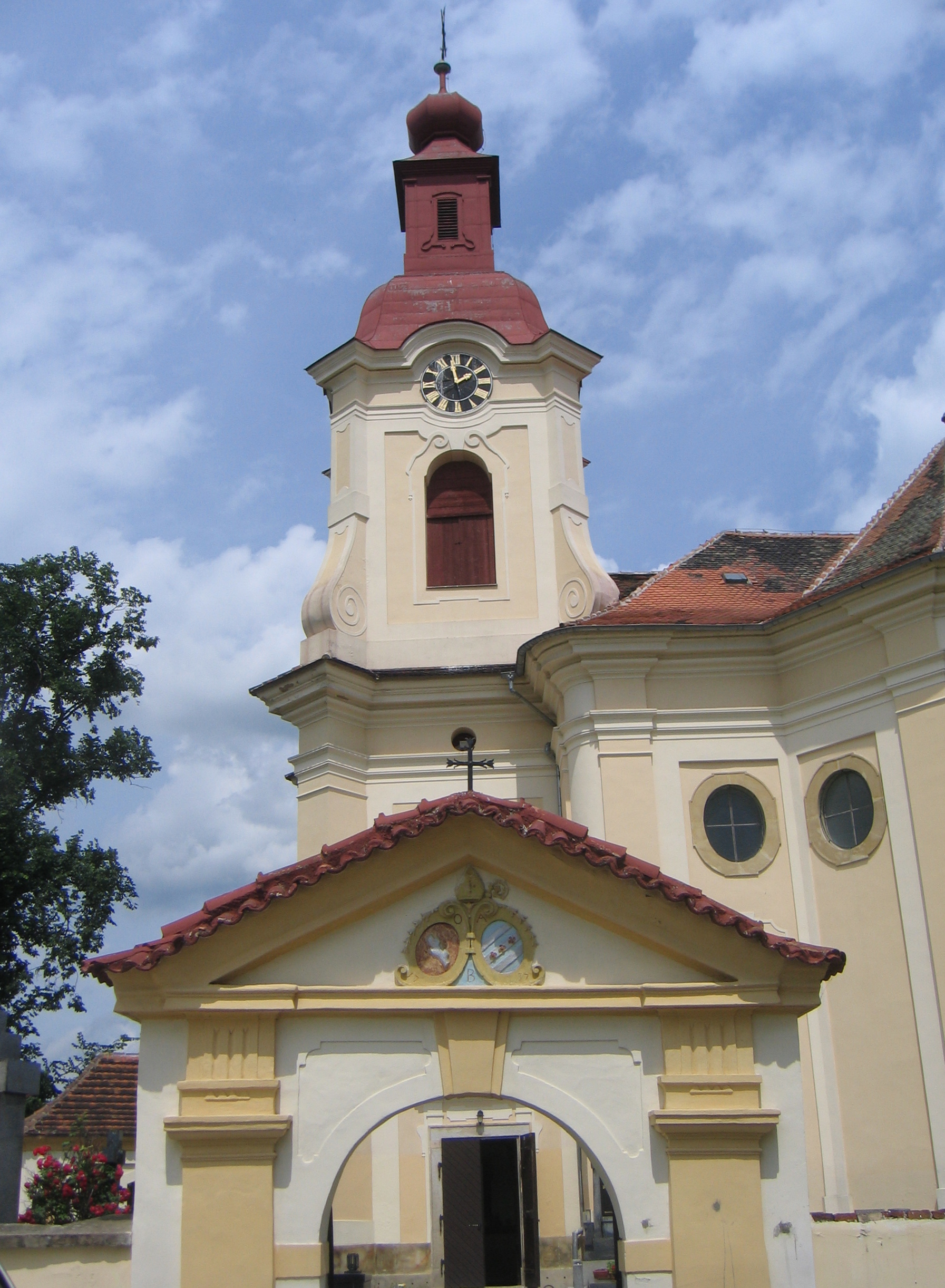 Kostel sv. Vojtěcha (Počaply), Počaply